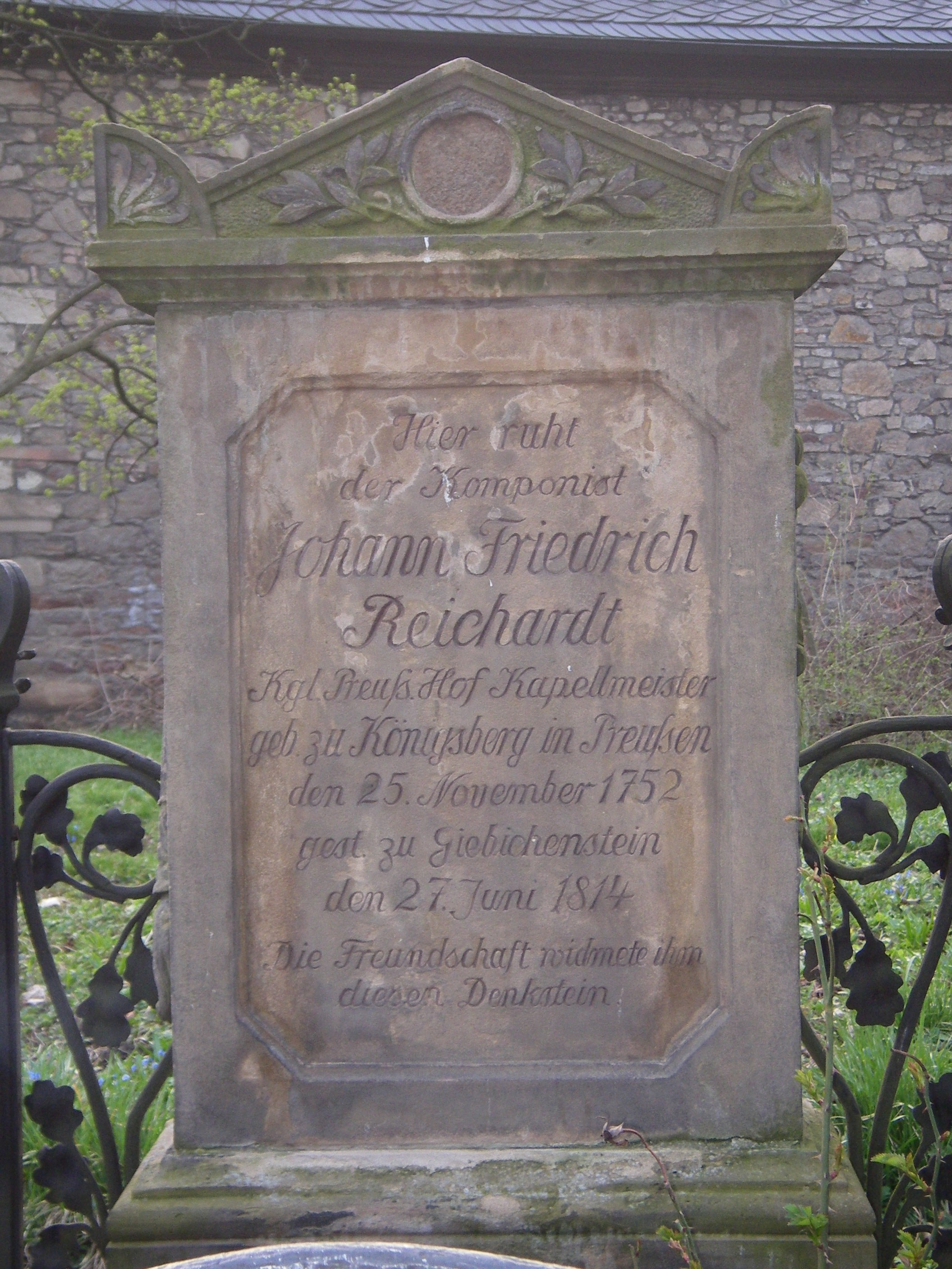 Grabstein von Johann Friedrich Reichardt auf dem Friedhof der Bartholomäus-Kirche Halle (Saale)